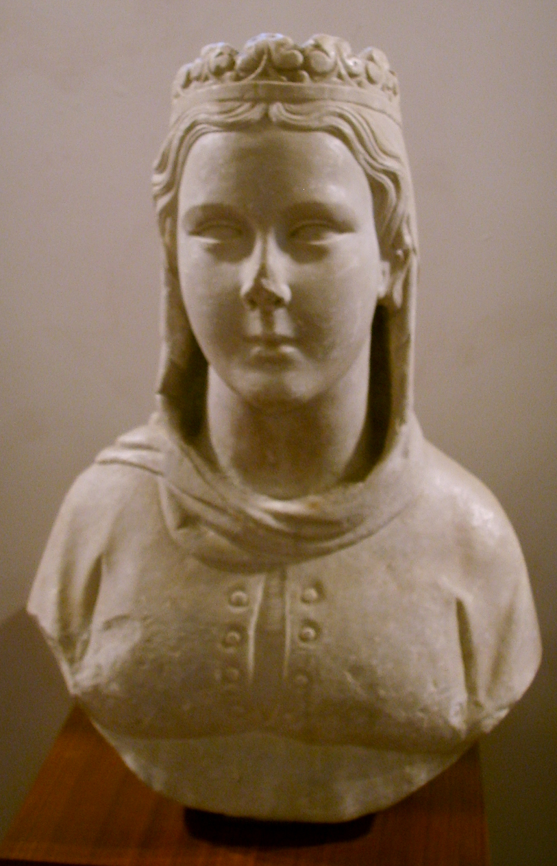 Opera del duomo (FI), Tino di Camaino, personificazione di virtù (1320 circa)